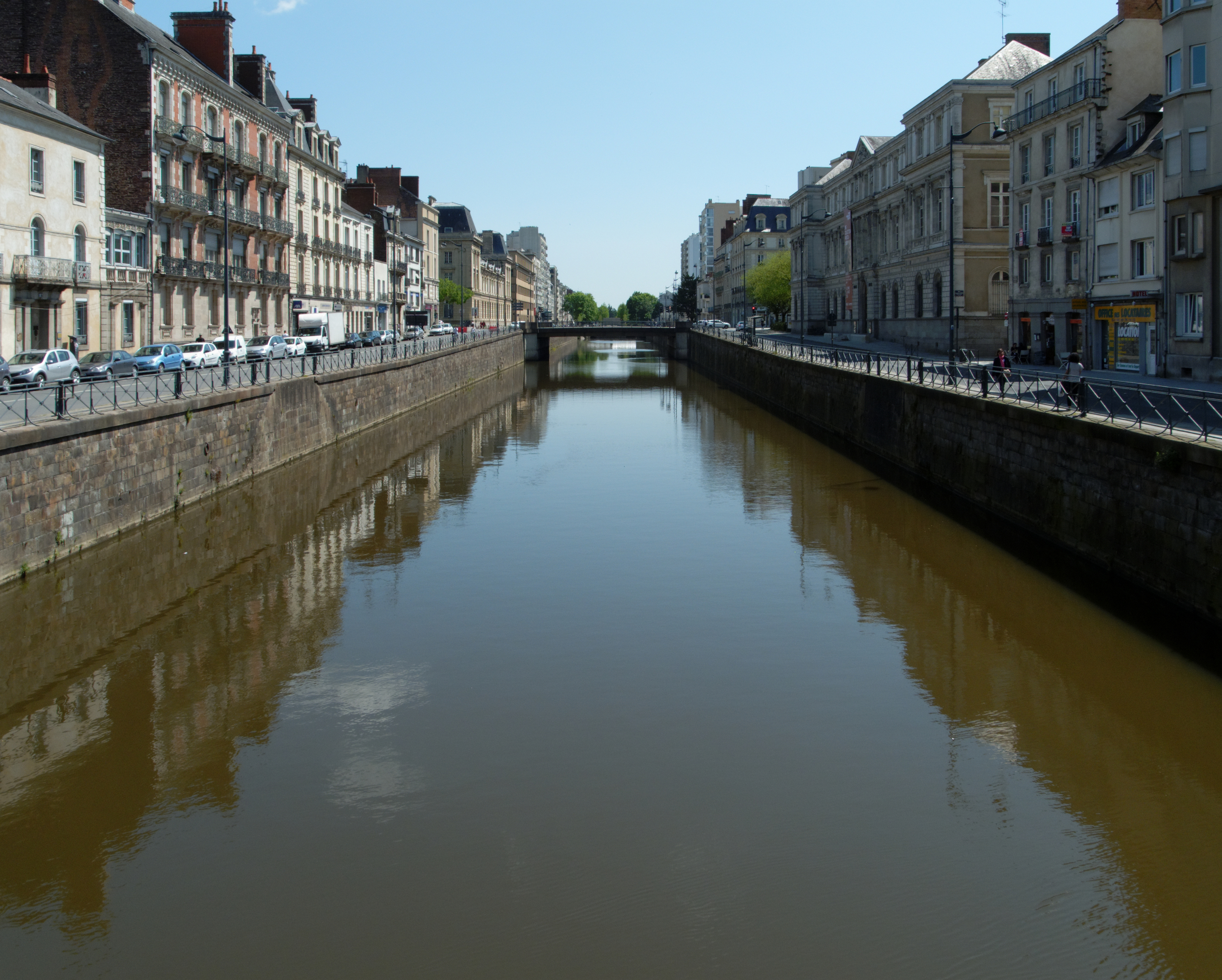 La Vilaine, à Rennes.